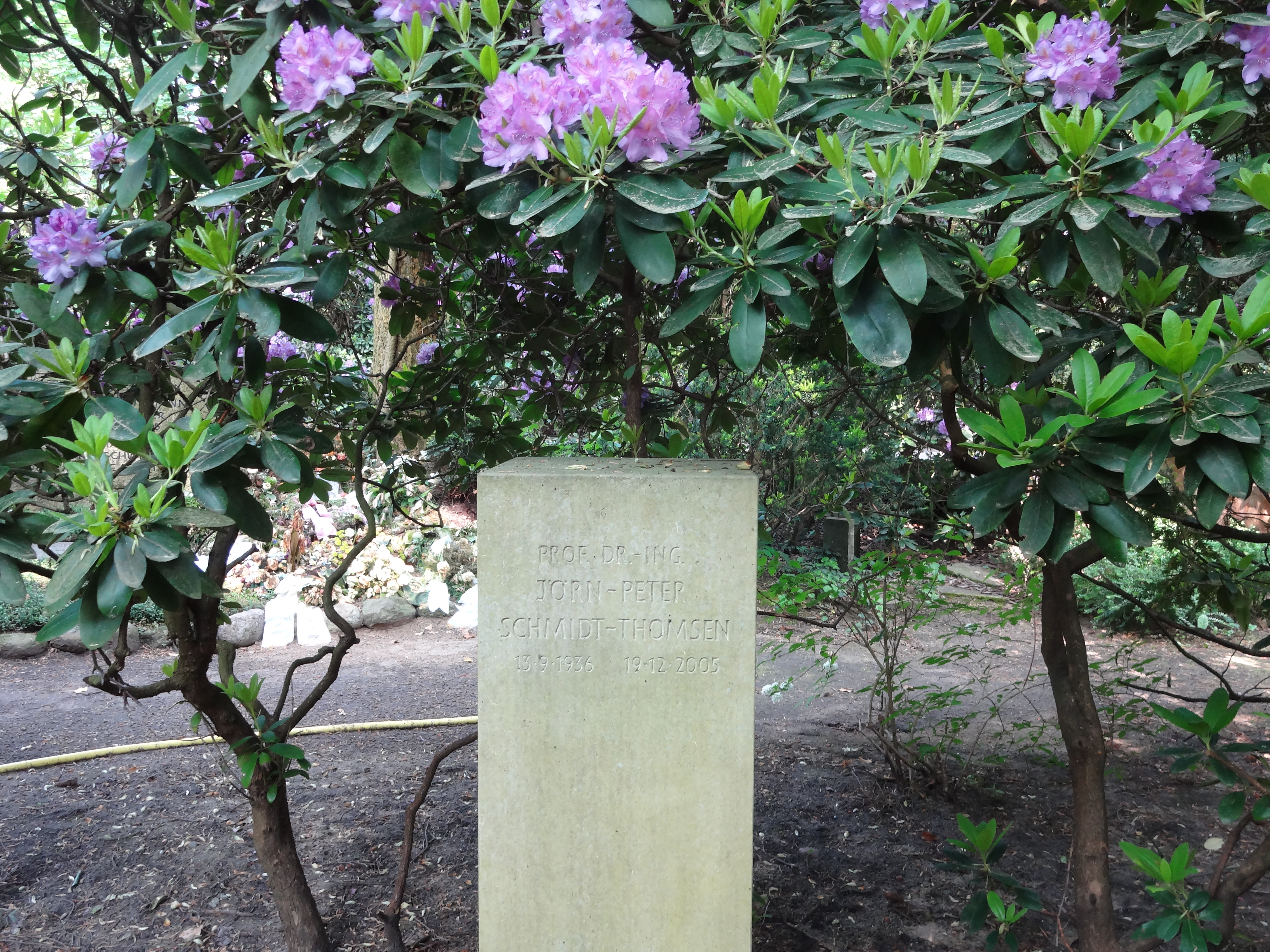 Grab von Prof. Jörn-Peter Schmidt-Thomsen auf dem Friedhof Heerstraße in Berlin